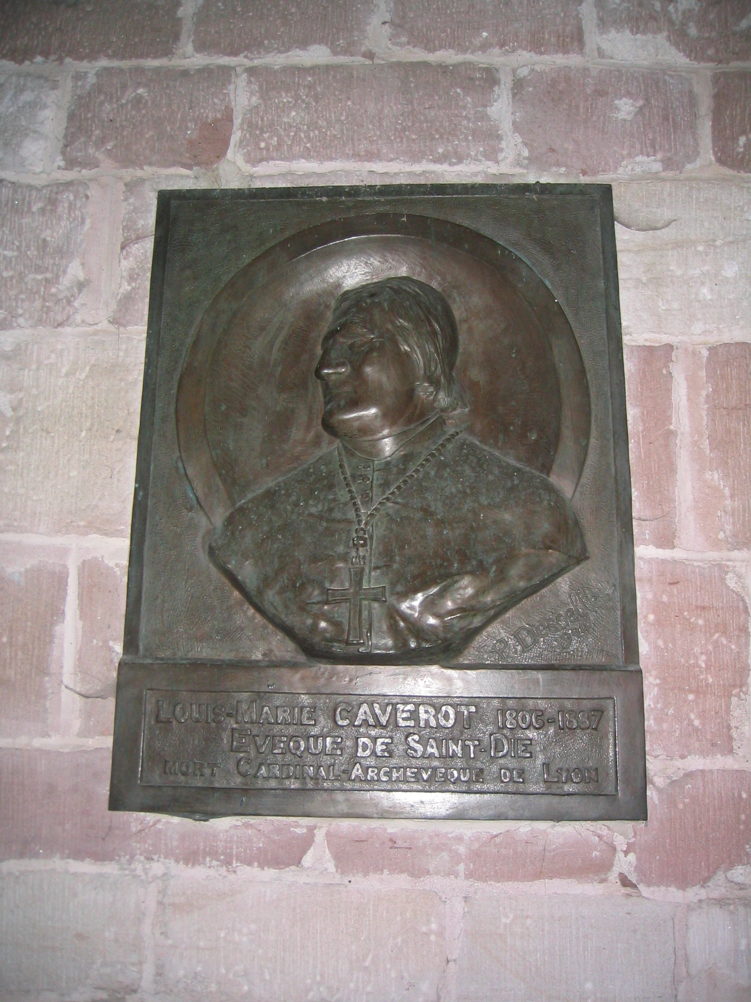 Effigie de Mgr. Caverot, évêque de Saint-Dié (Eglise Notre-Dame de Galilée à Saint-Dié-des-Vosges)